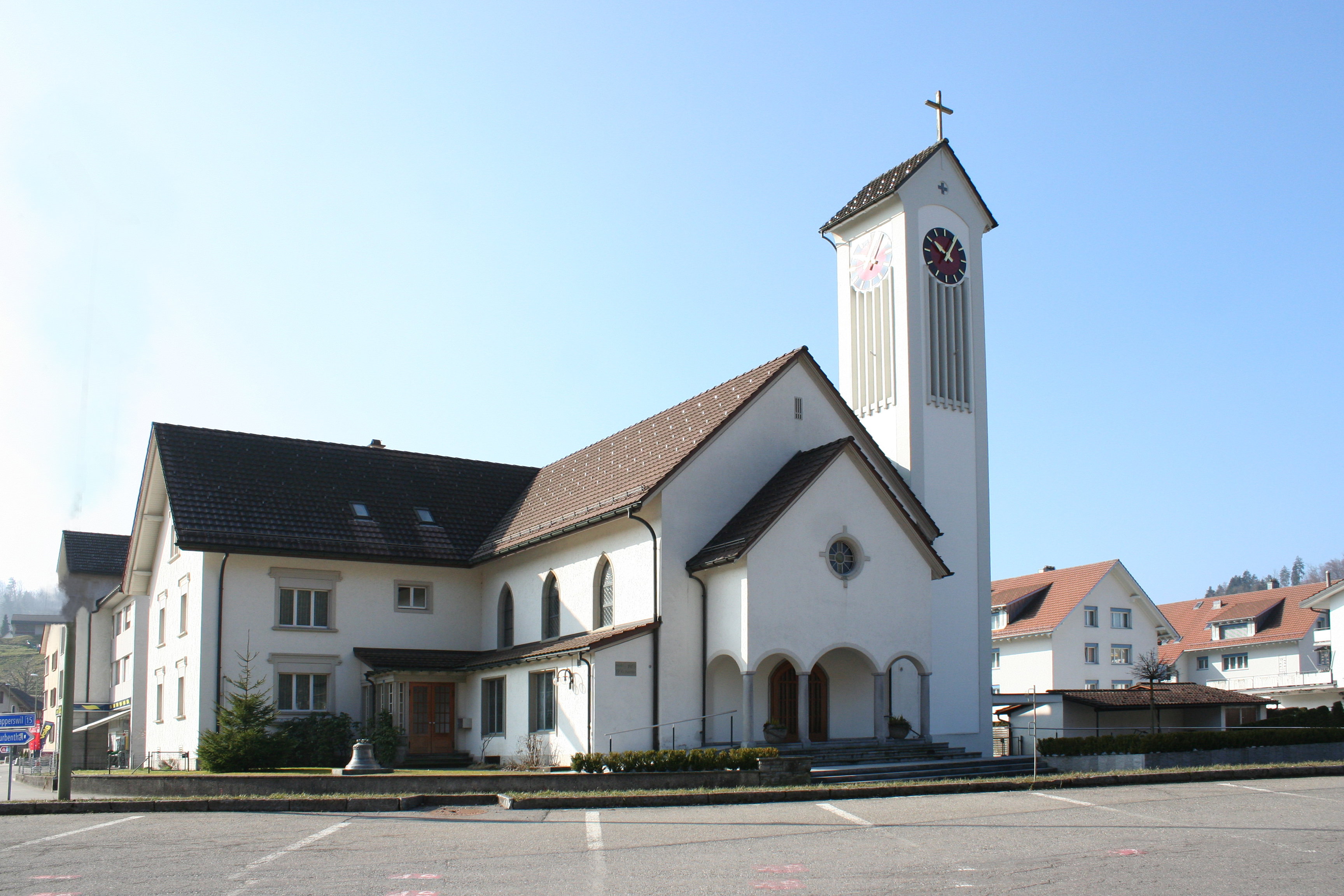 Römisch-katholische Kirche St. Anton Bauma, Aussenansicht